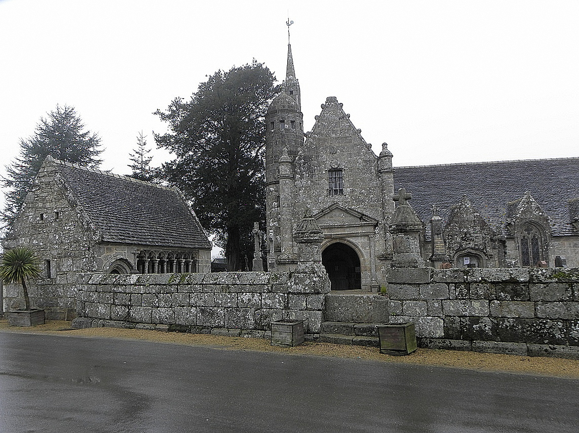 Vue méridionale de l'église Saint-Sylvestre de Plouzélambre (22).